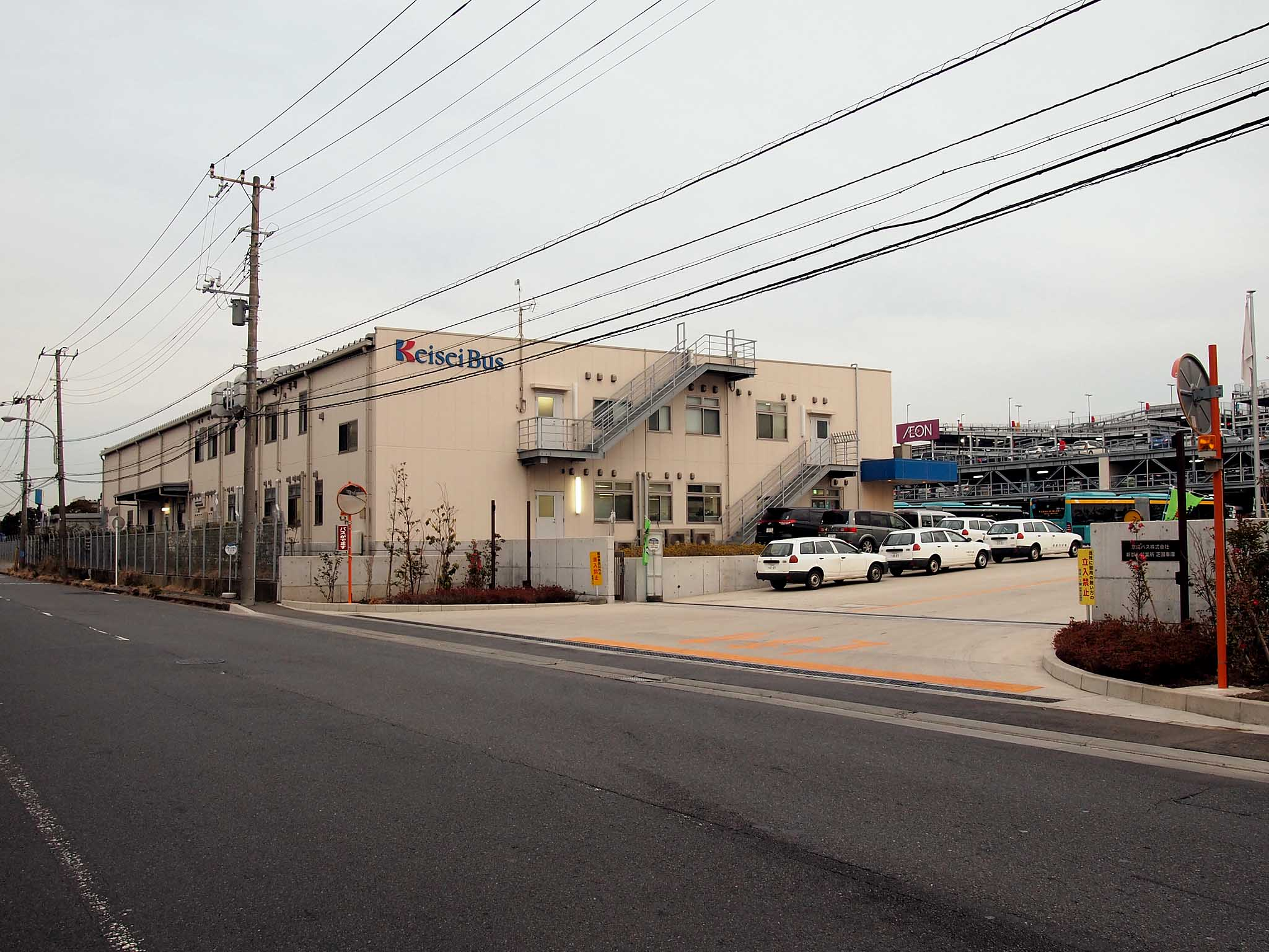 2012年に開設された京成バス新都心営業所芝園車庫。営業所の裏に習志野市と千葉市の境界線が通っていて、イオンモール幕張新都心に近い。